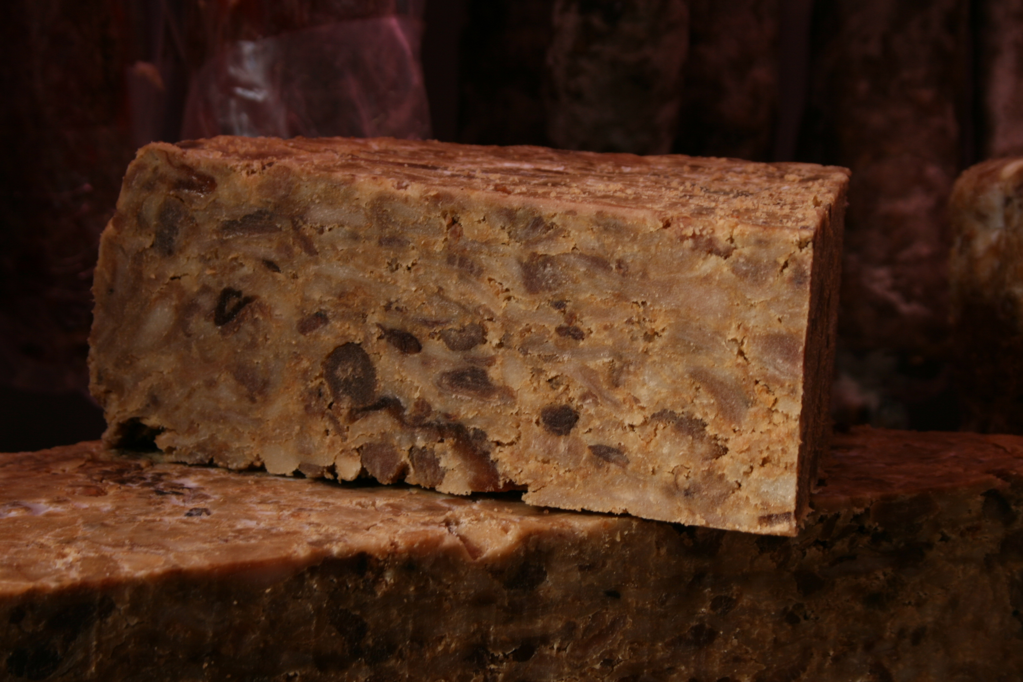 Chicharrón de cerdo (Mercado de Salamanca)